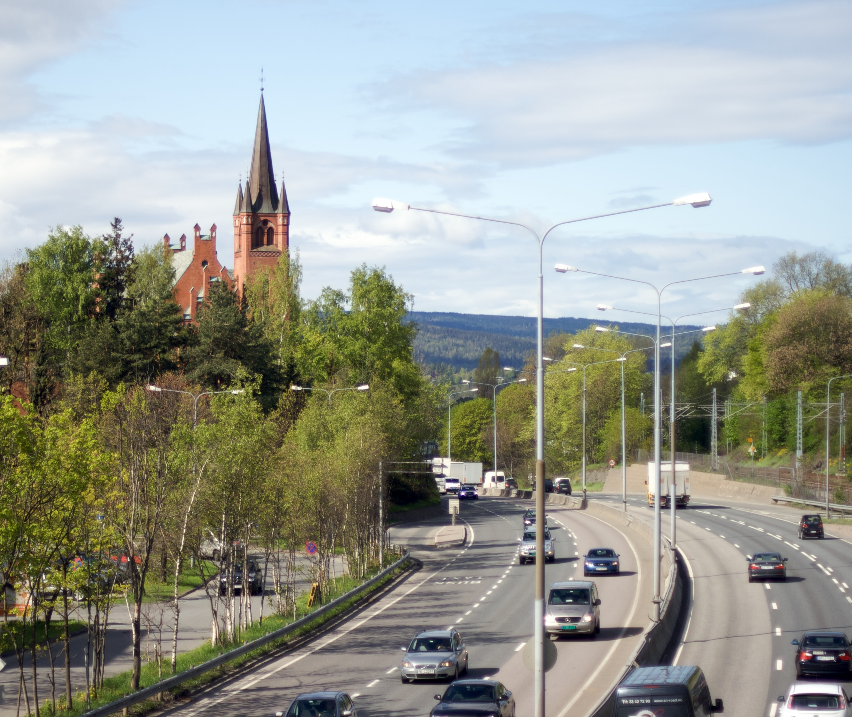 Høvik kirke i Bærum og E18, sett fra broen over motorveien.